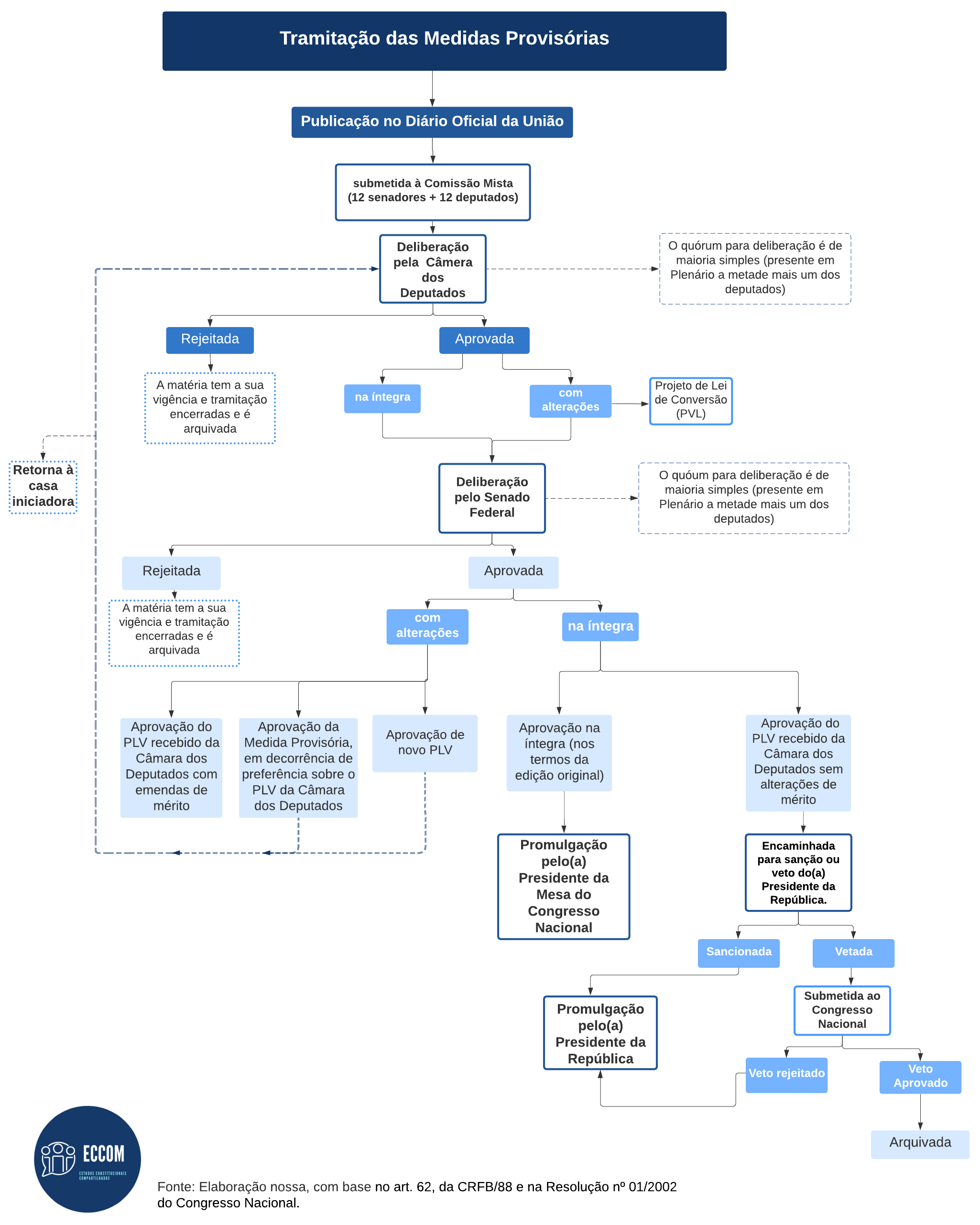 Infográfico processo de tramitação das medidas provisórias